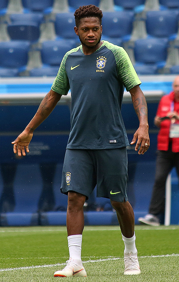 Грядет латиноамериканская битва. Сборные Бразилии и Коста-Рики готовятся к матчу